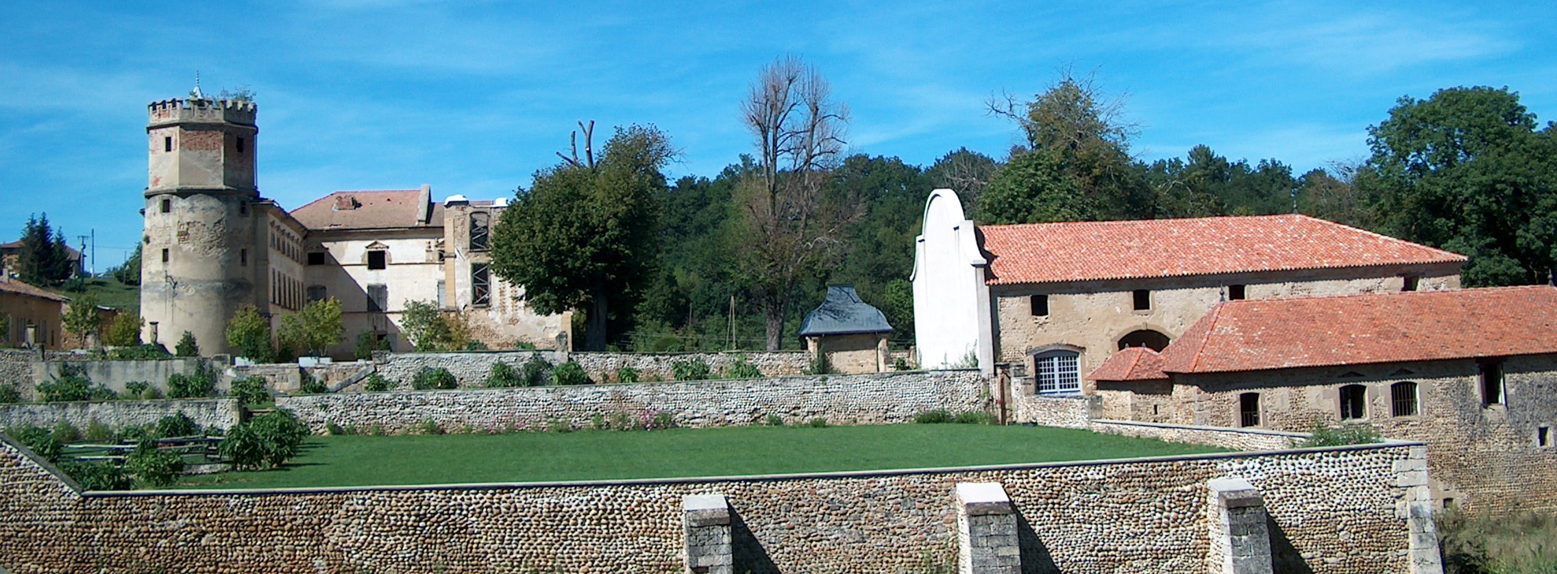 Château de l'Arthaudière à St Bonnet de Chavagne (Isère) Vue générale du site Photo prise par Daniel Etienne